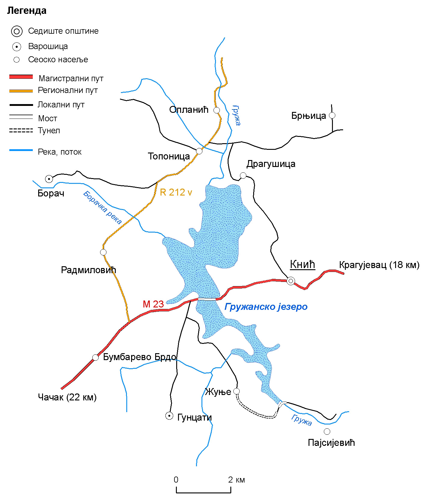 Мапа Гружанског језера